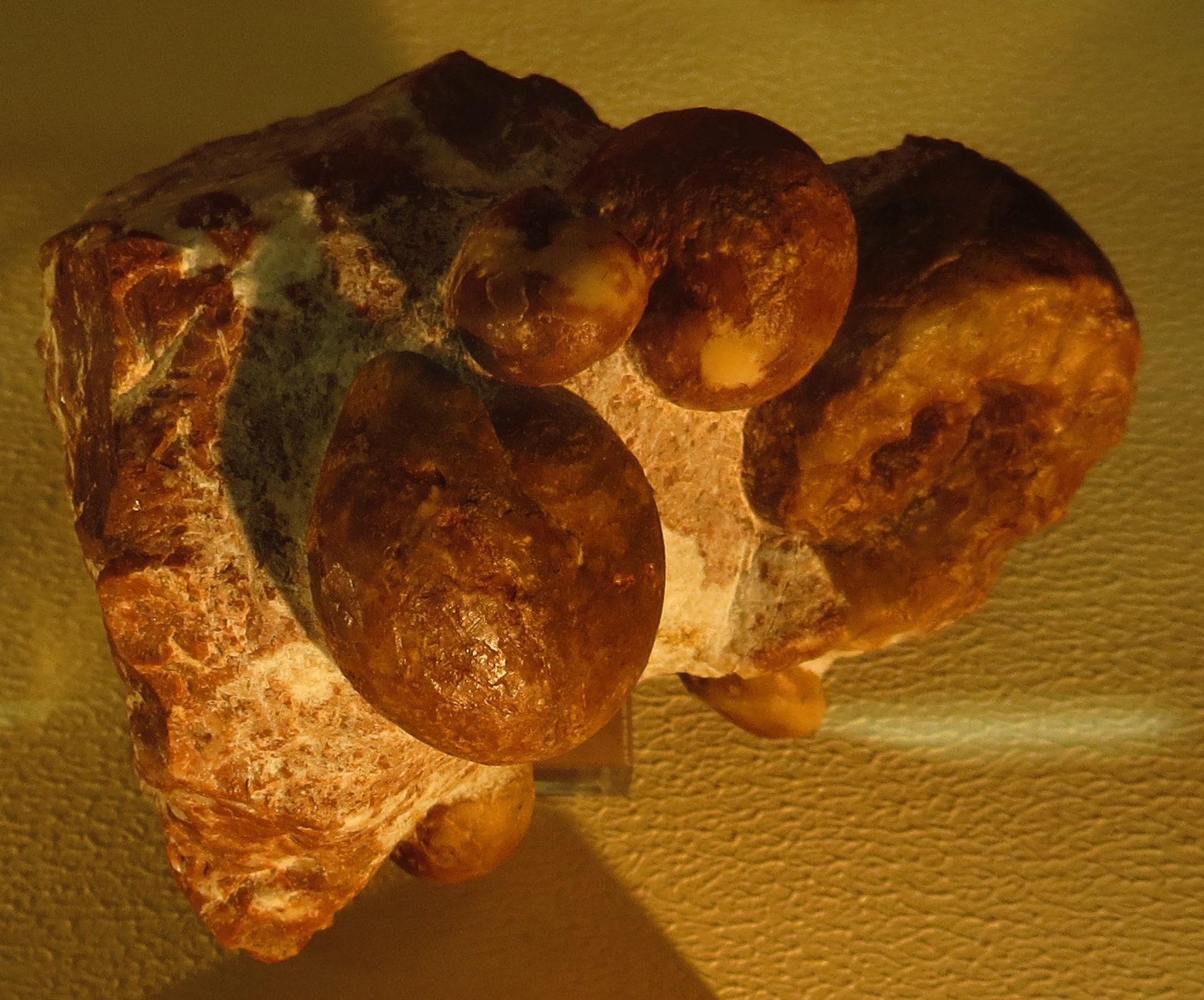 Took the picture at Burgmeister Muller Museum, Solnhofen